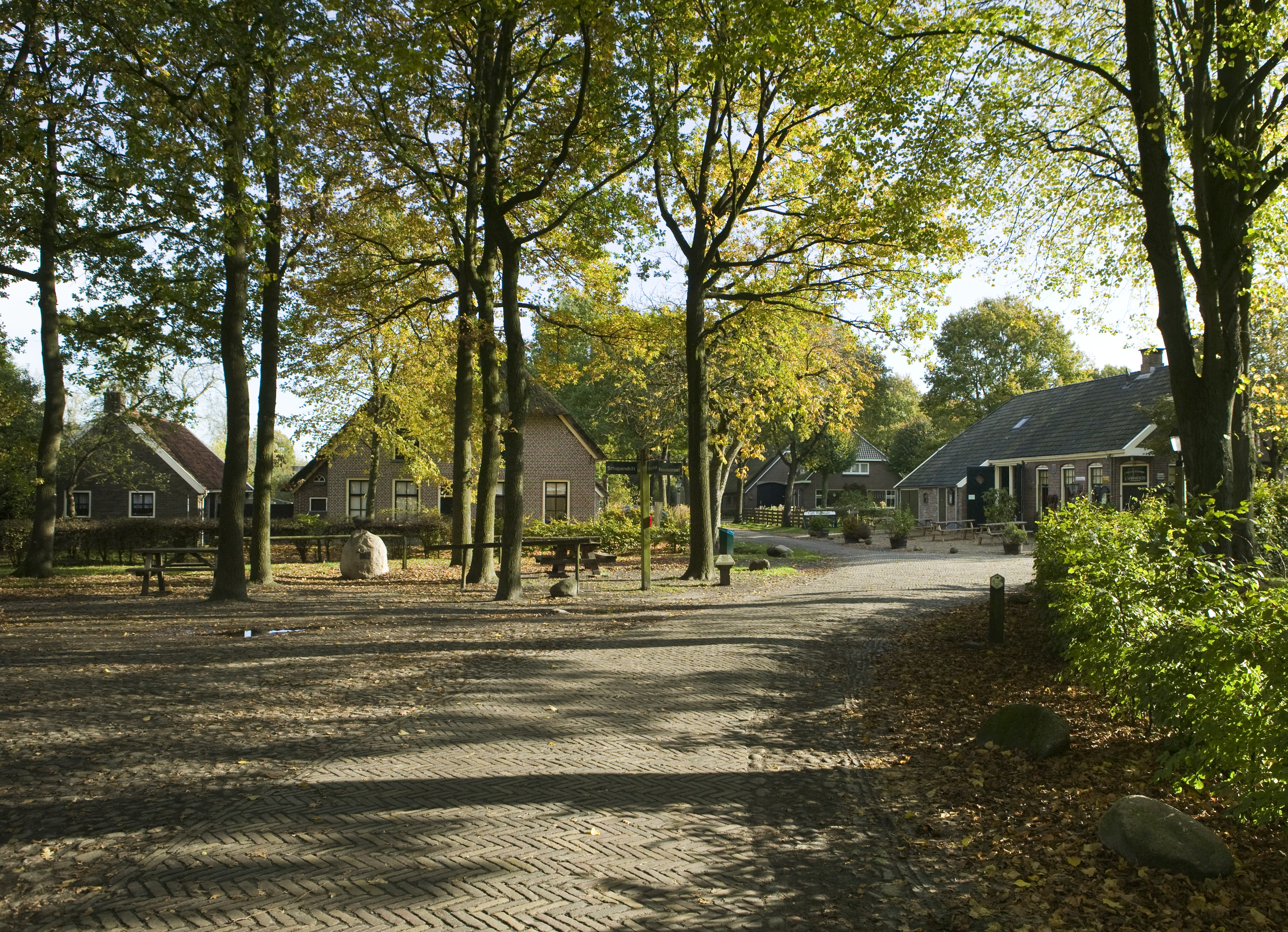 Boerderijen: Overzicht, dorpsplein ook wel dorpsbrink (opmerking: Gefotografeerd voor Foto Folie Nieuwbouw) This is a possible Rijksmonument: Find the monument in the Monuments database: in Orvelte All Rijksmonumenten in Orvelte Is this a Rijksmonument? Yes No More information about this project and help. More images to work at in Category:Possible Rijksmonumenten.